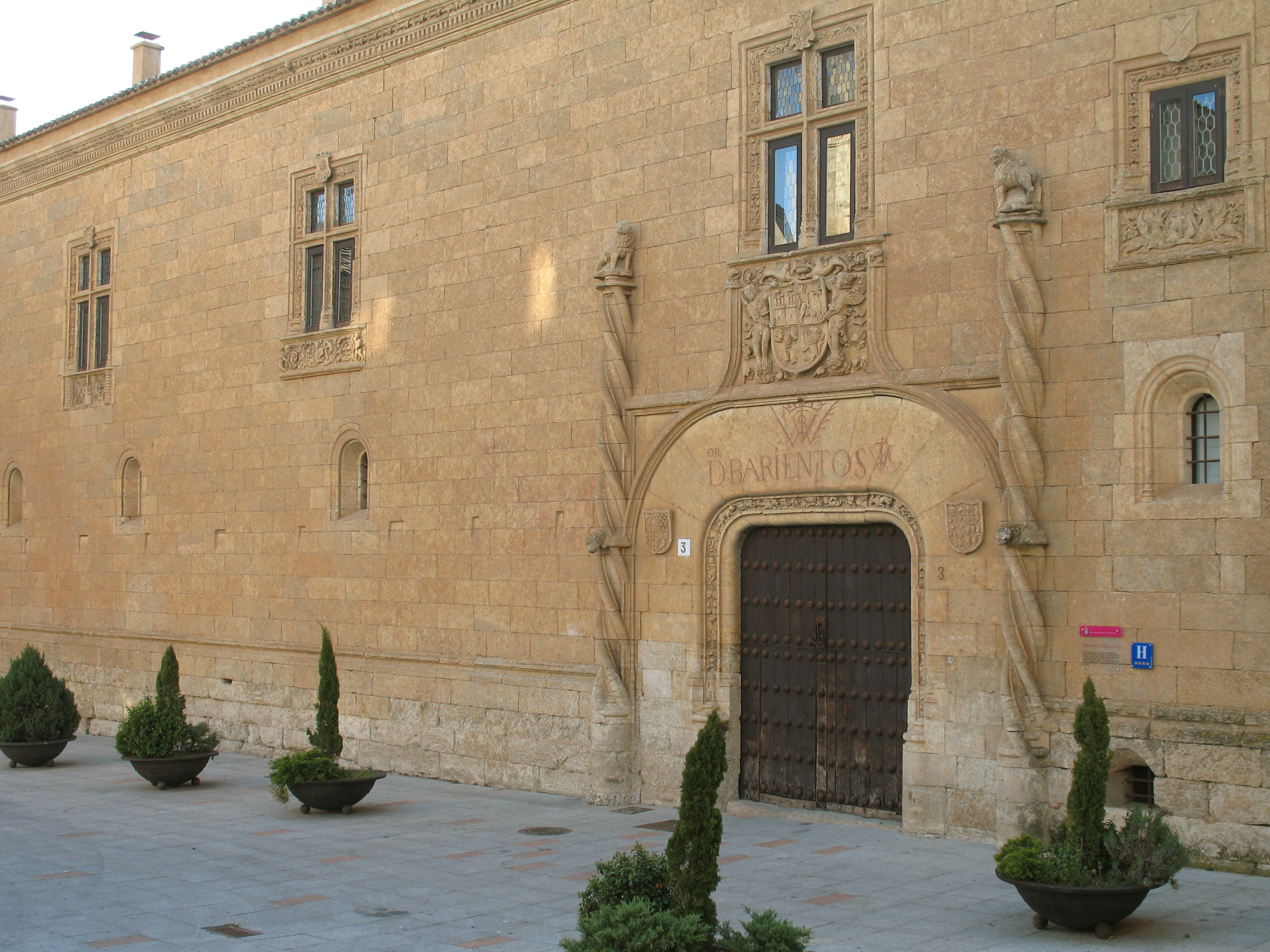 Palacio de los Ávila y Tiedra, también llamado de los Castro o de los Montarco.